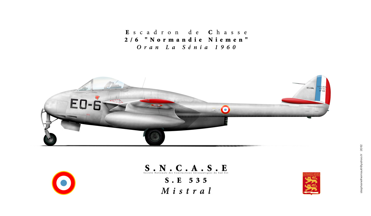 SNCASE Mistral SE 535 2/6 normandie niemen